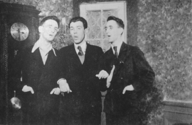 Sławomir Buczyński ps. "Seta", Władysław Refling ps. "Kruk", Marian Buczyński ps. "Zapiewajło" w pokoju Józefa Szczepańskiego ps. "Ziutek"